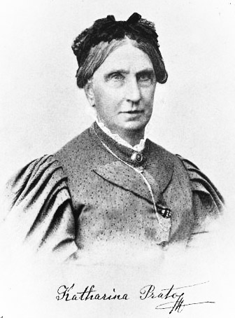 Katharina Prato (1818-1897), Austrian writer on cooking / österreichische Kochbuchautorin.